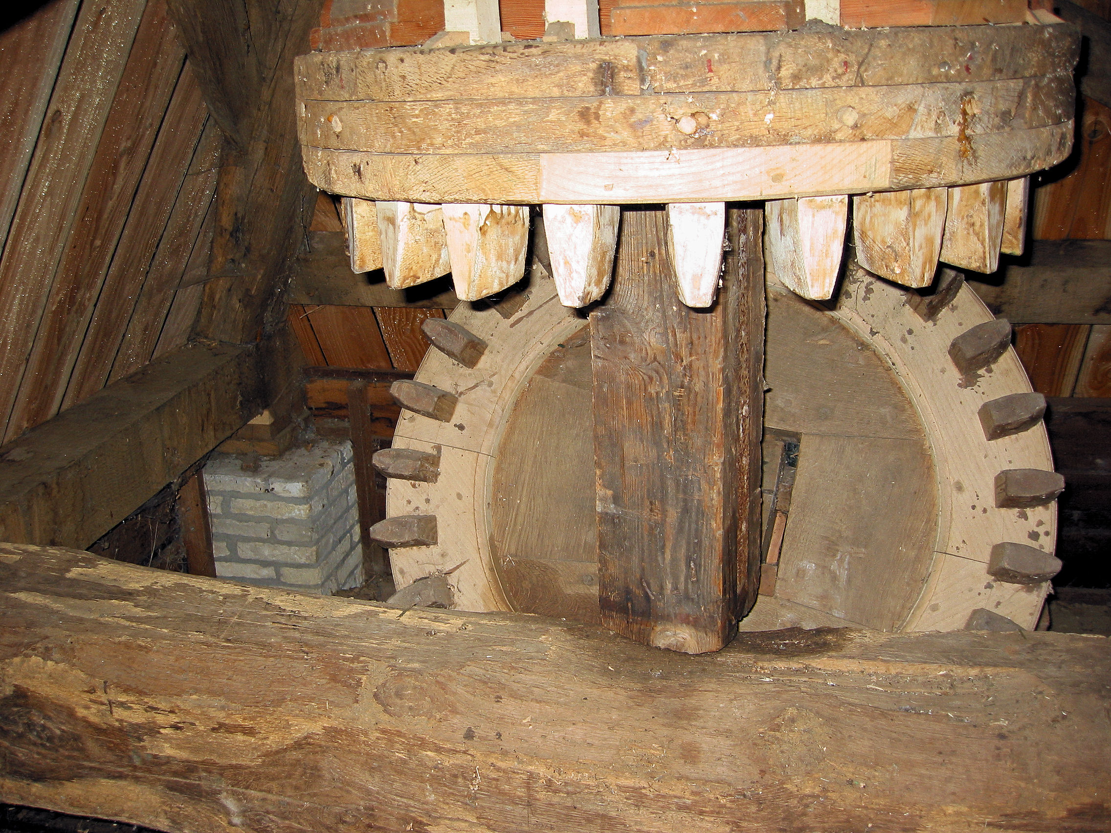 Spinnenkopmolen: onderbonkelaar met vijzelwiel